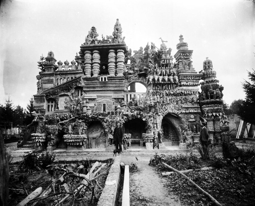 Der französischer Postbote Ferdinand Cheval mit dem von ihm erbauten sogenannten „Palais idéal“.